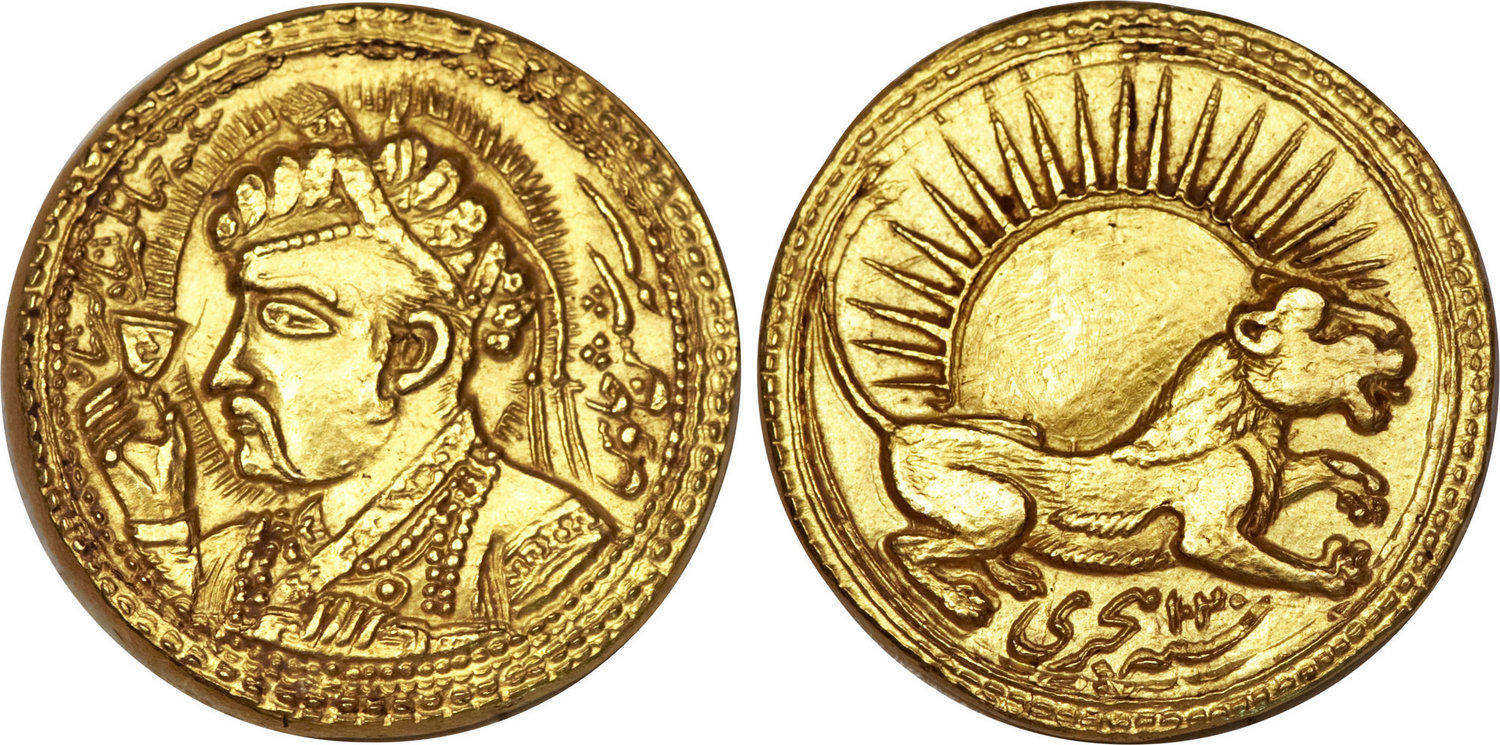 عملة ذهبية تذكارية من جهانكير للسنة السادسة من الحكم